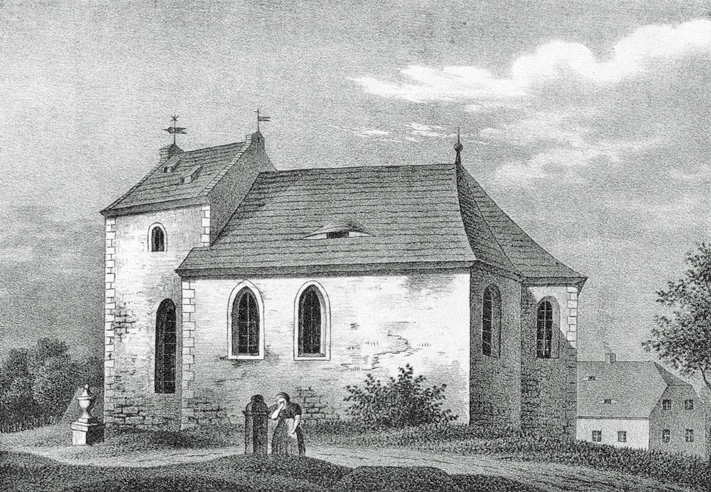 Die Wehrkirche in Höfgen um 1840